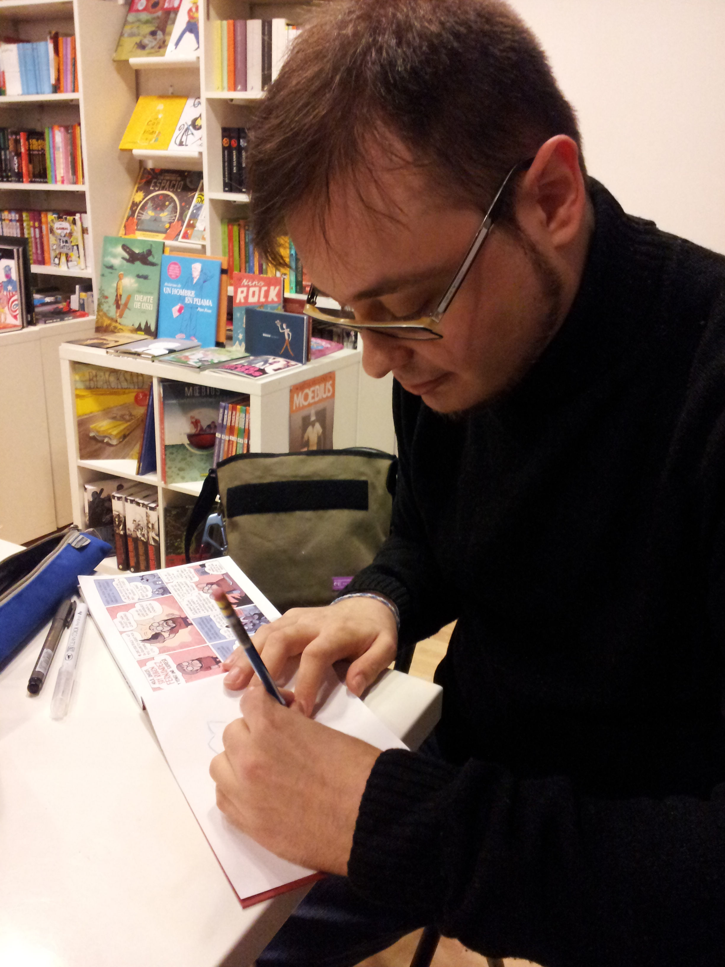 Fernández signant exemplars.